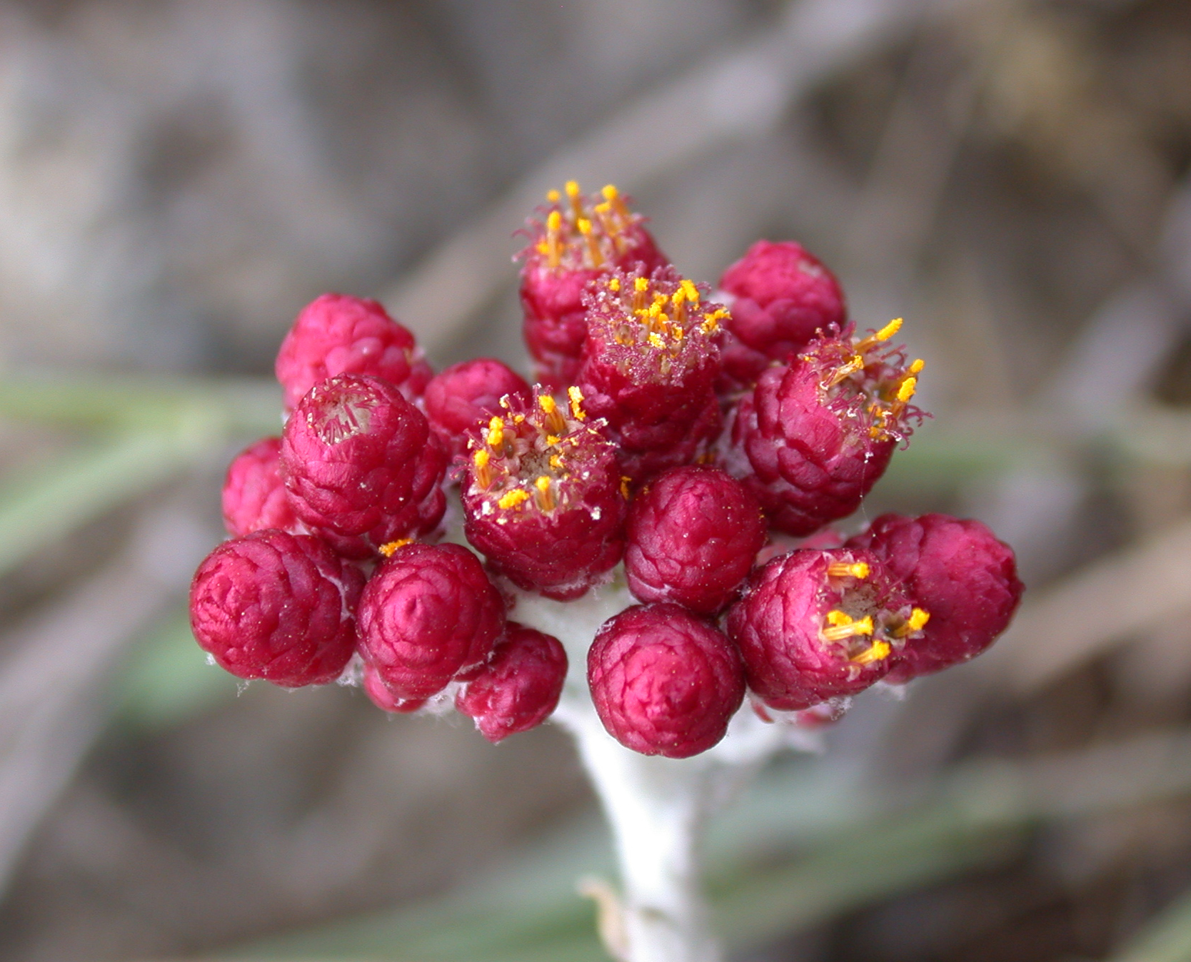 Helichrysum sanguineum (L.) Kostel. (דם-המכבים האדום), Mount Carmel, Israel, April 29, 2008.